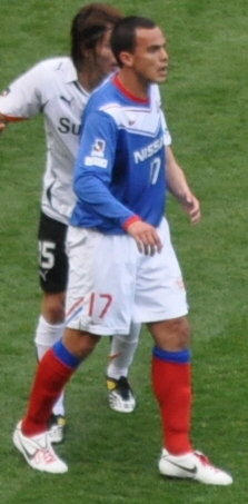 Bastianini